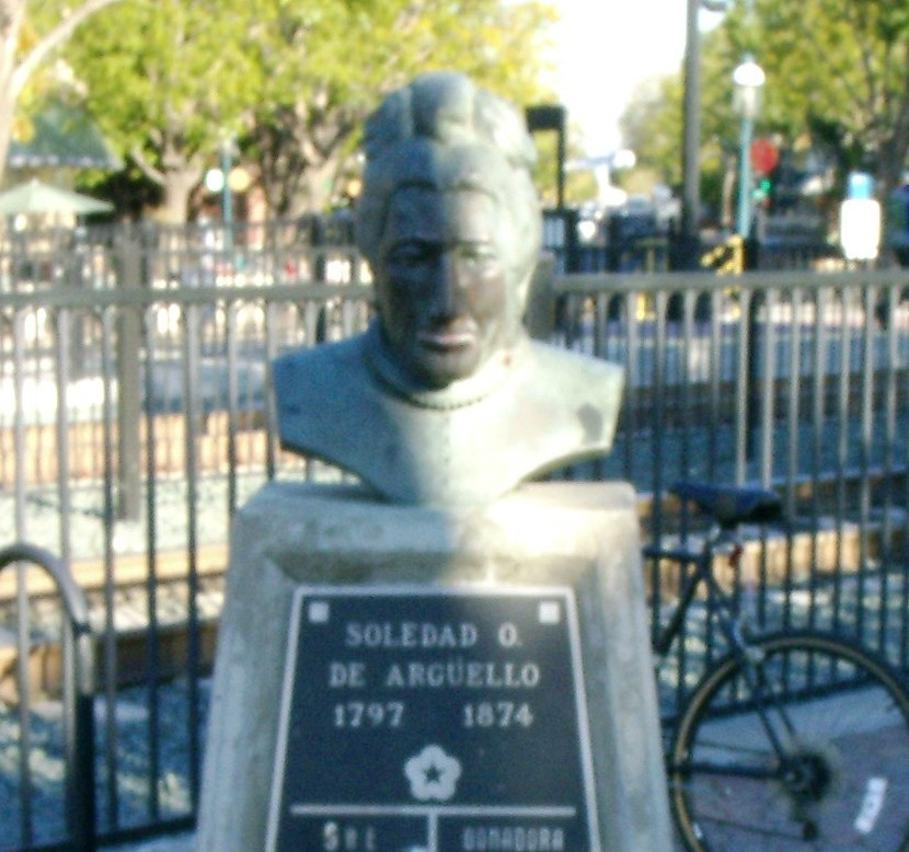 Maria Soledad Ortega de Argüello